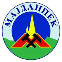 Amblem opštine Majdanpek